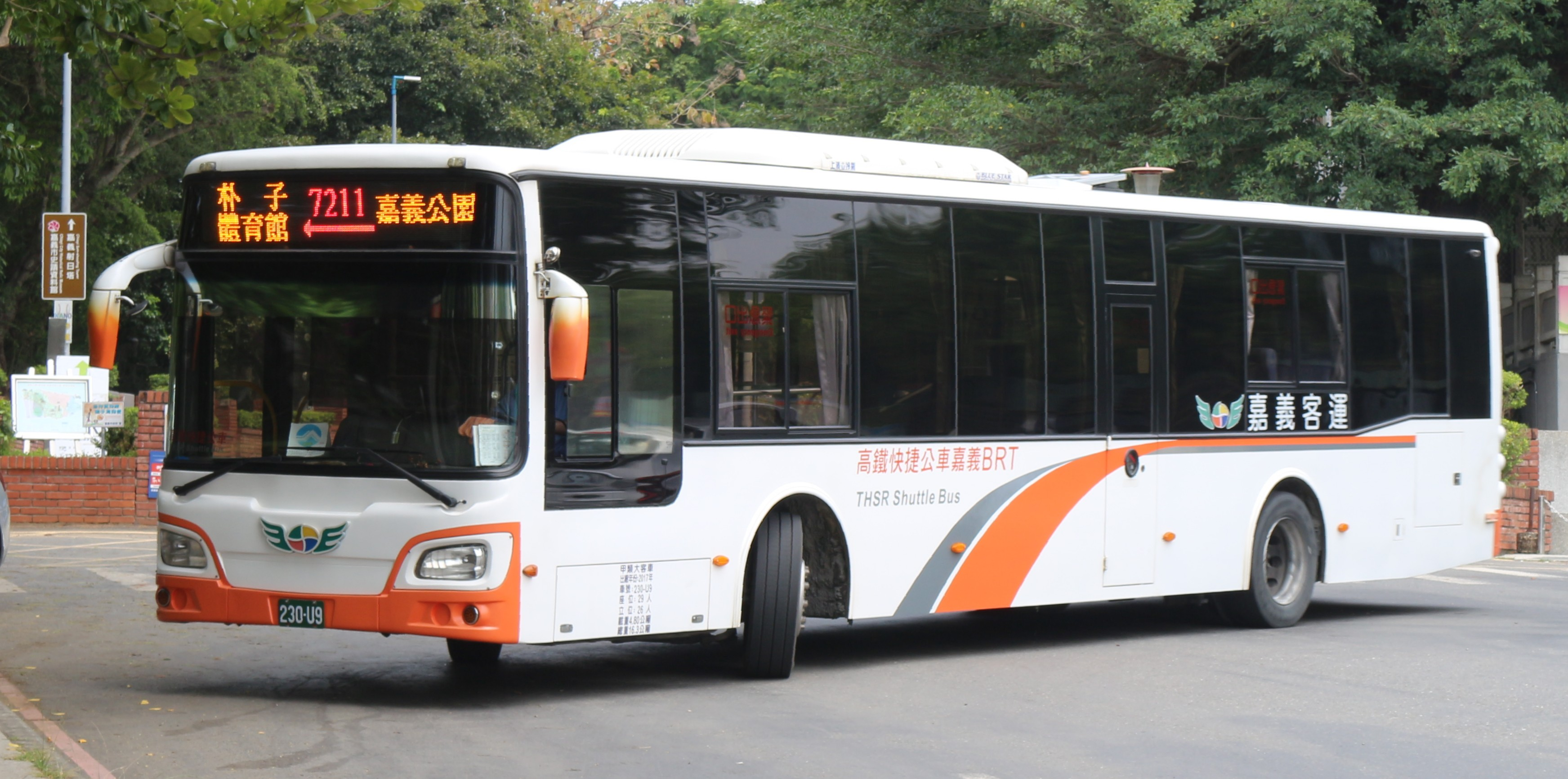 嘉義客運2017 HINO HS8JRVL-UTF 230-U9 BRT